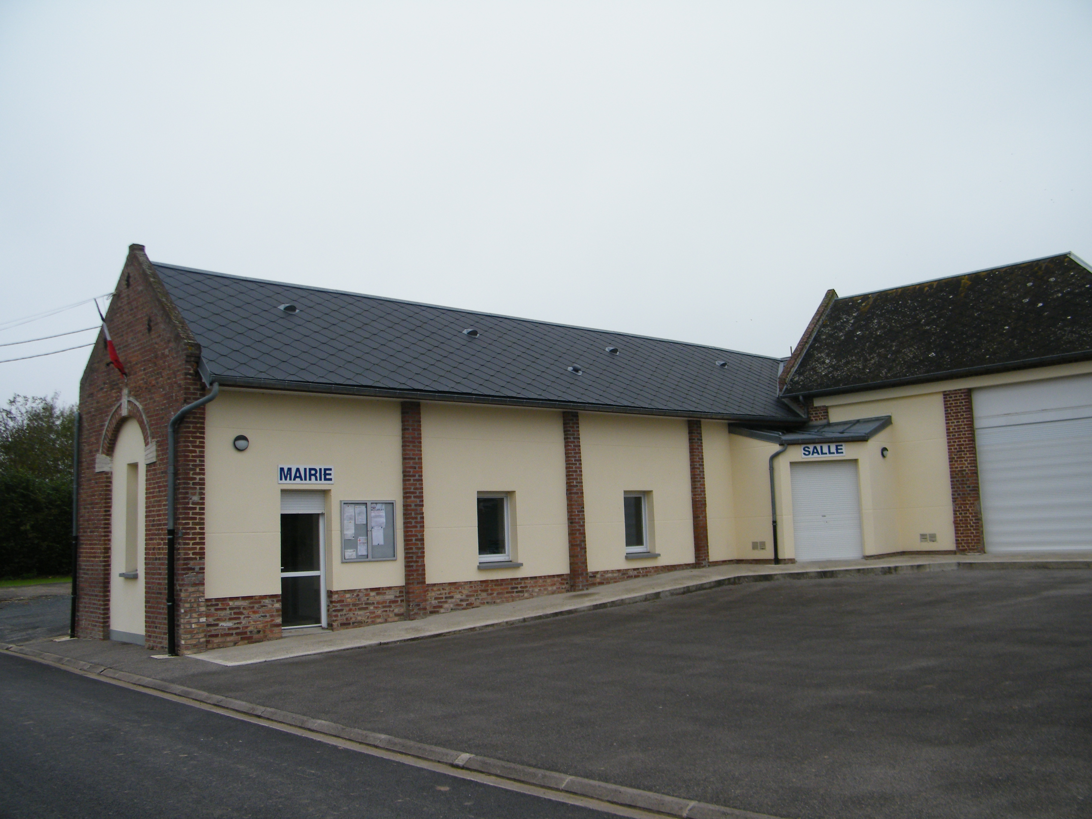 Bâtiments communaux.